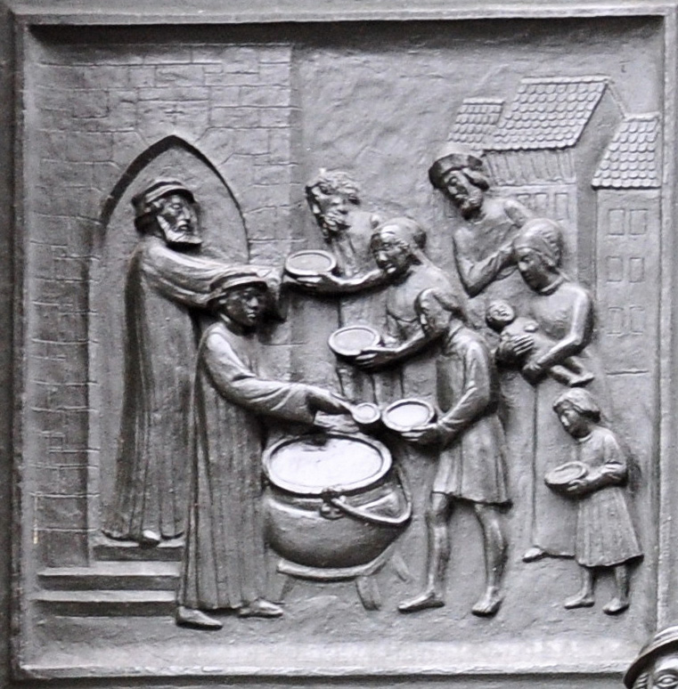 Der Mushafen, Detail des Zwingliportals (1939 Otto Münch) am Grossmünster Zürich